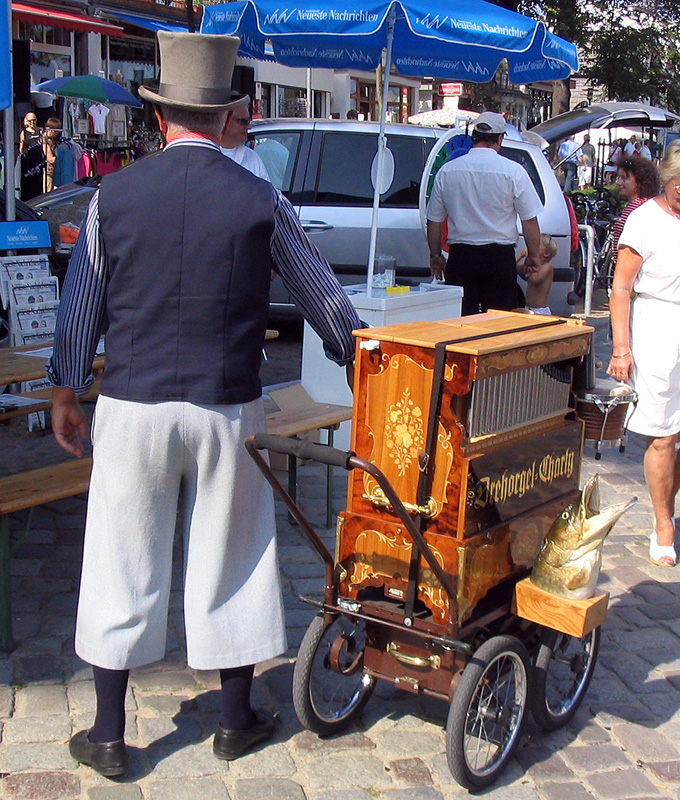 Drehorgel - Leierkasten